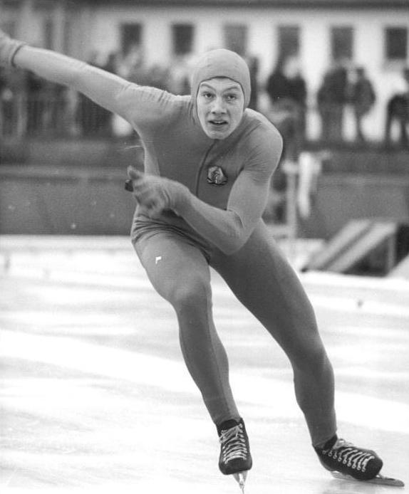 Andreas Dietel ADN-ZB Mittelstädt 22.1.78-sus-Berlin: Mehrkampftitel an Andreas Dietel- Andreas Dietel vom SC Dynamo Berlin wurde am 22.1.1978 in der Hauptstadt DDR-Meister im großen Mehrkampf des Eisschnellaufes. Er verwies Andreas Ehrig (TSC Berlin) und seinen Gemeinschaftskameraden Jürgen Warnicke auf die Plätze. (Foto stammt von den Vorläufen)